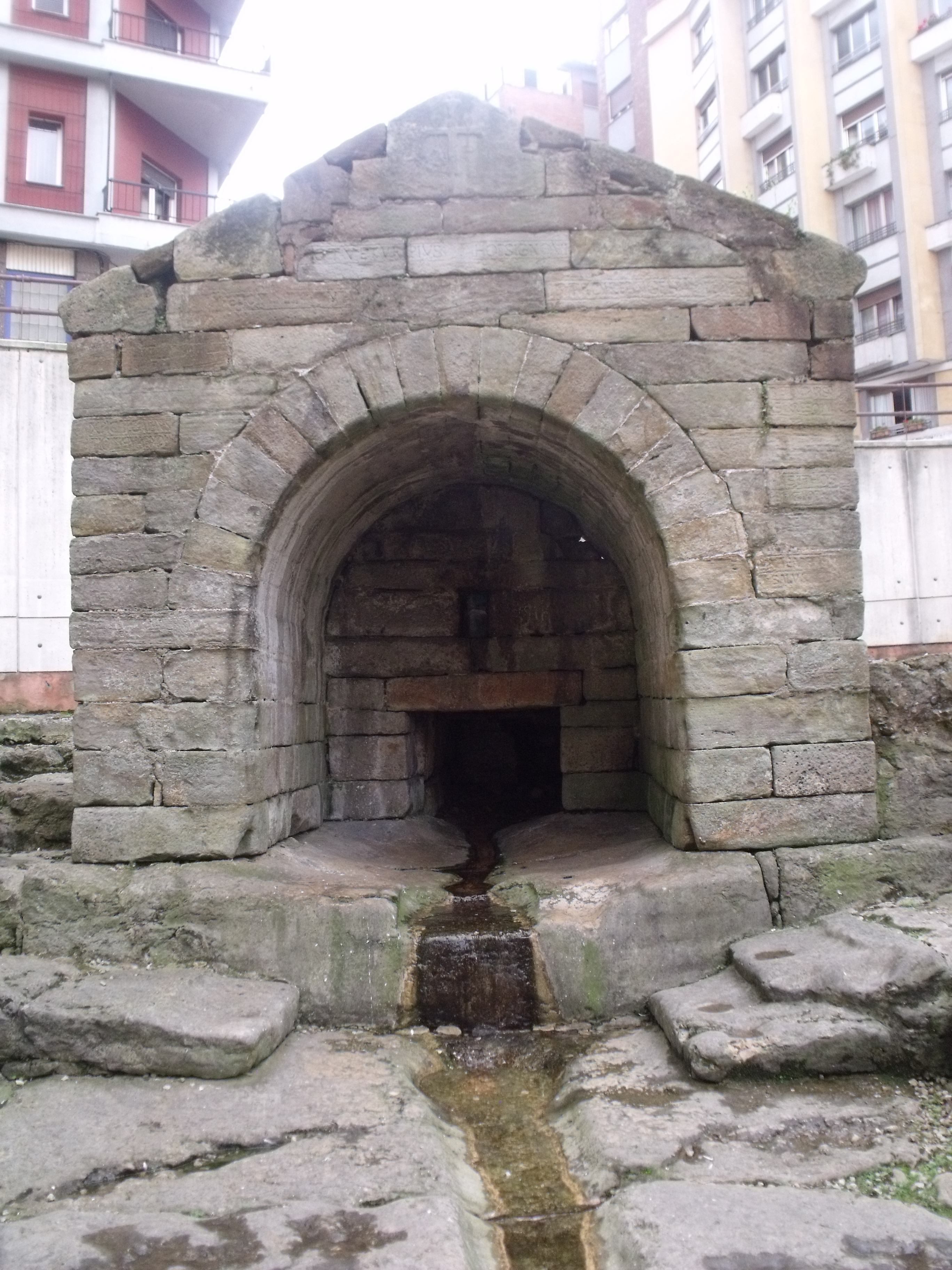 Vista de la fuente por delante